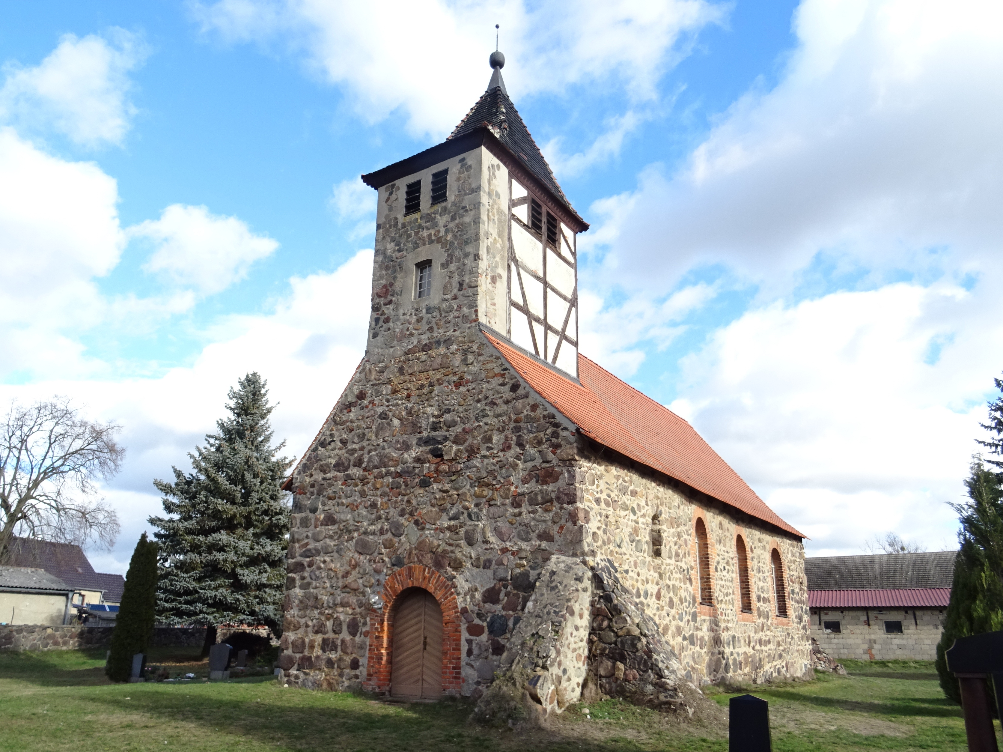 Denkmalgeschützte Dorfkirche in Wergzahna, Gemeinde Niedergörsdorf, Ansicht von Südwesten